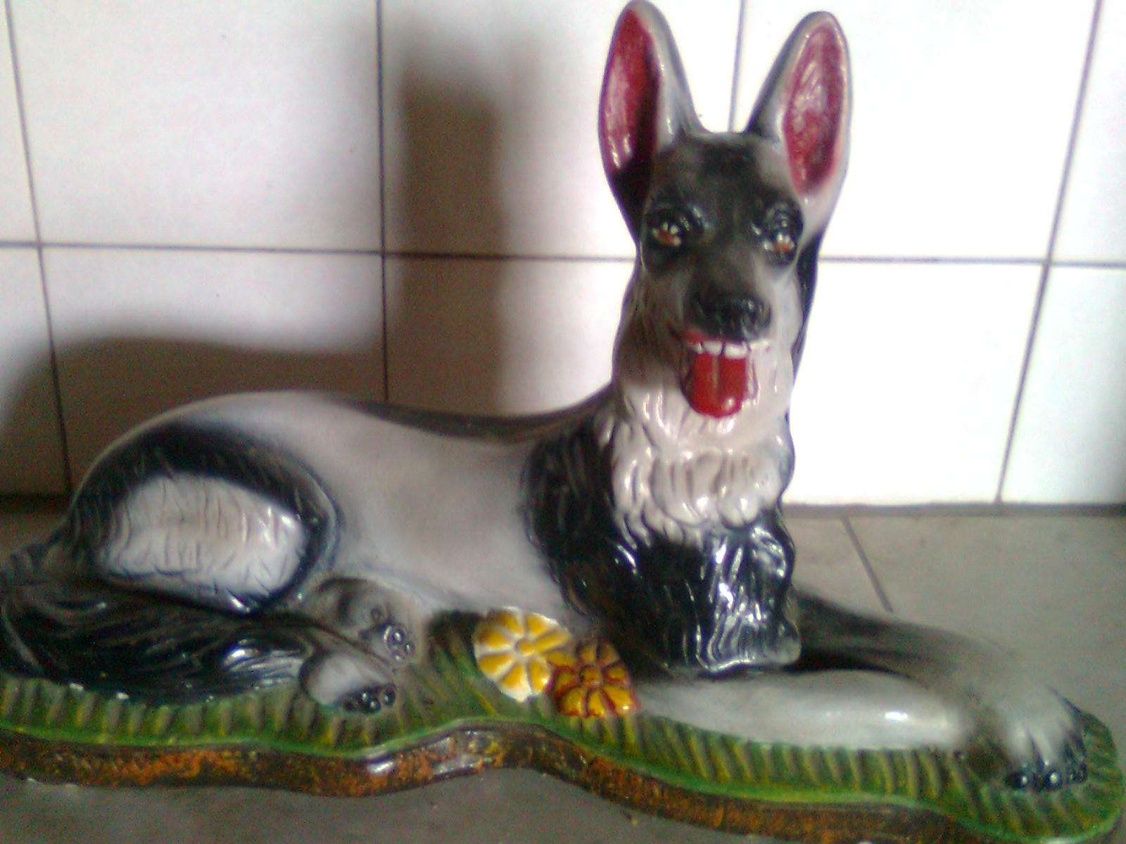 Perro de yeso kitsch. Común en las casas de la zona rural de Costa Rica.